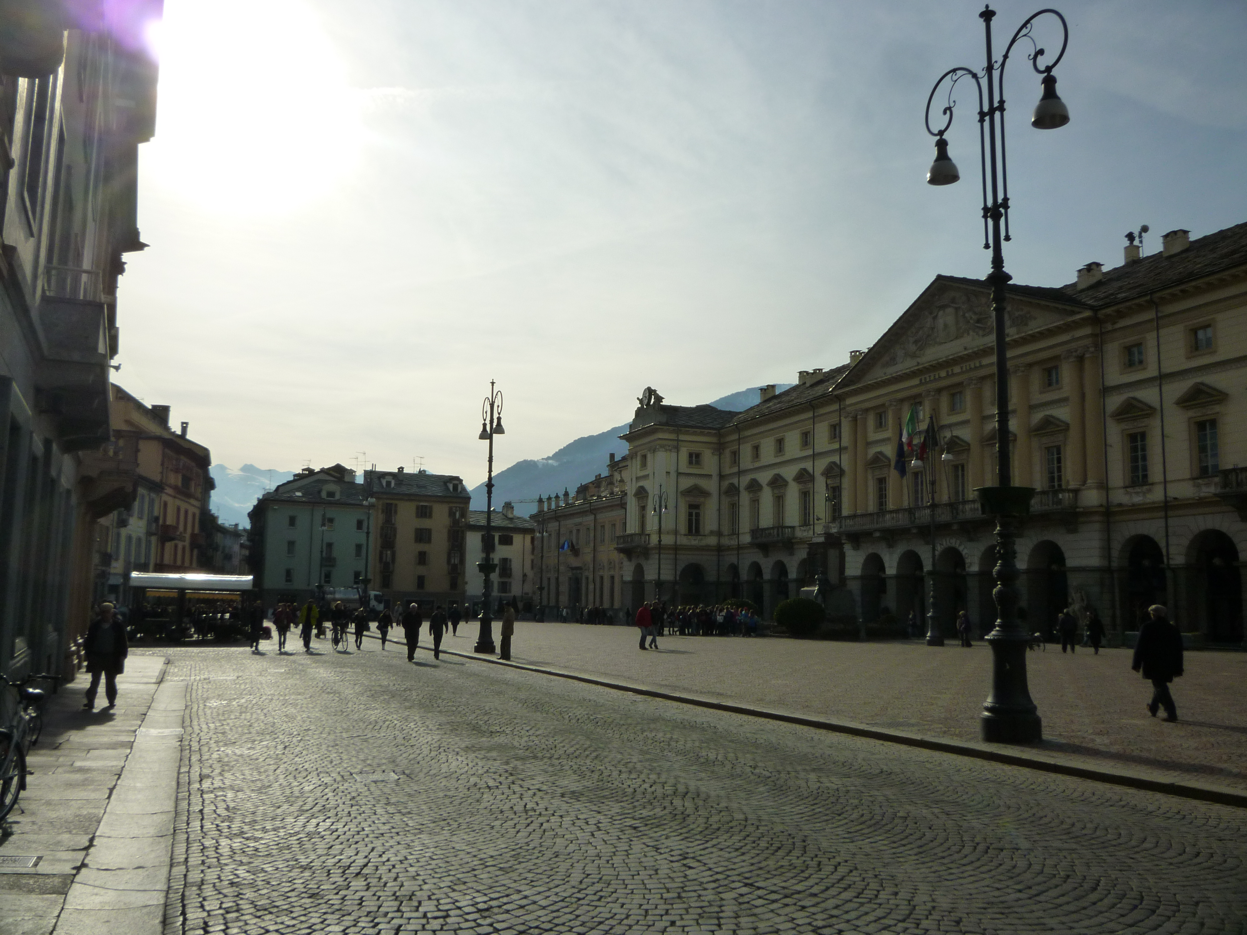 Place Emile Chanoux à Aoste